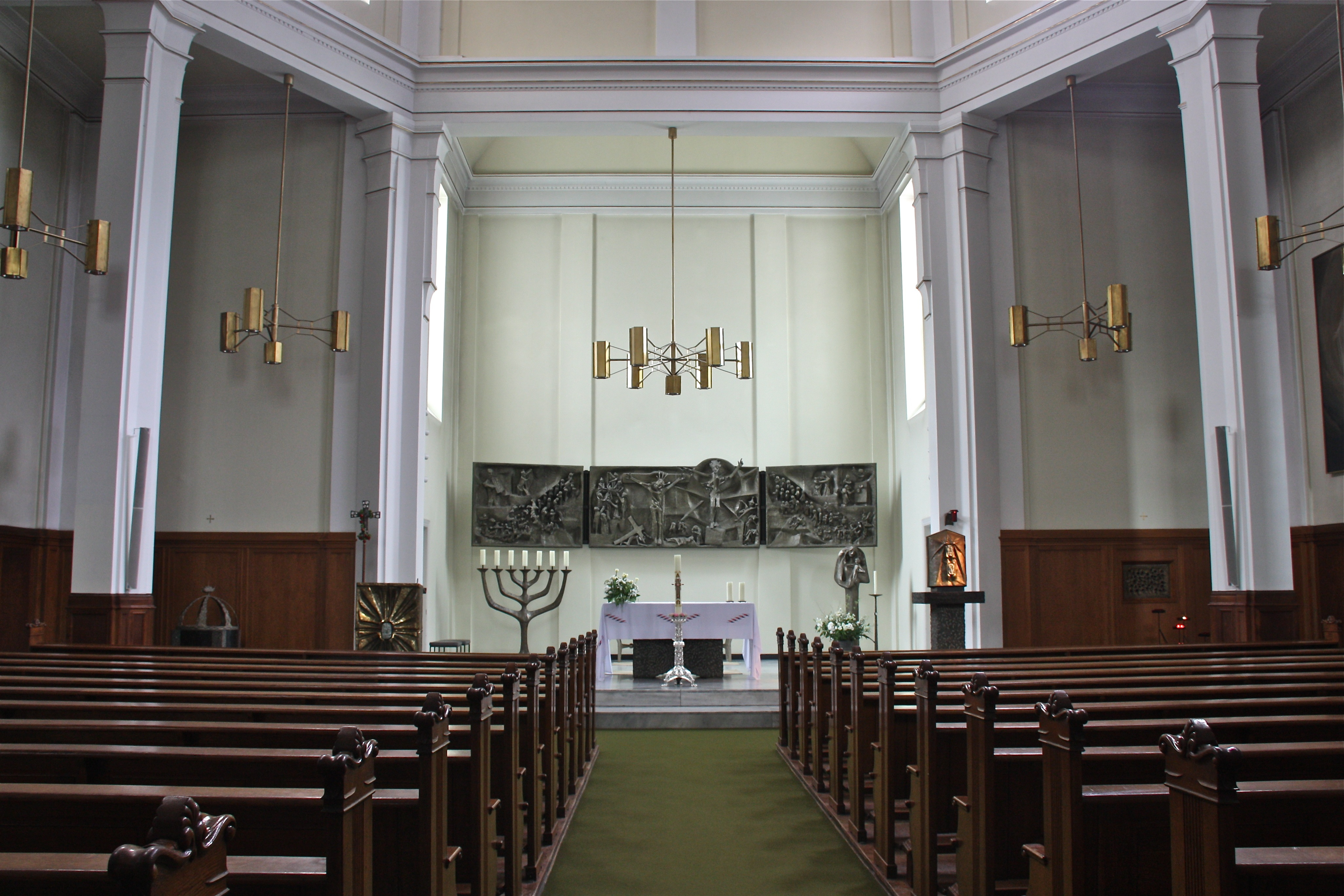 St.-Elisabeth-Kirche (Hamburg-Harvestehude), Blick auf den Altar